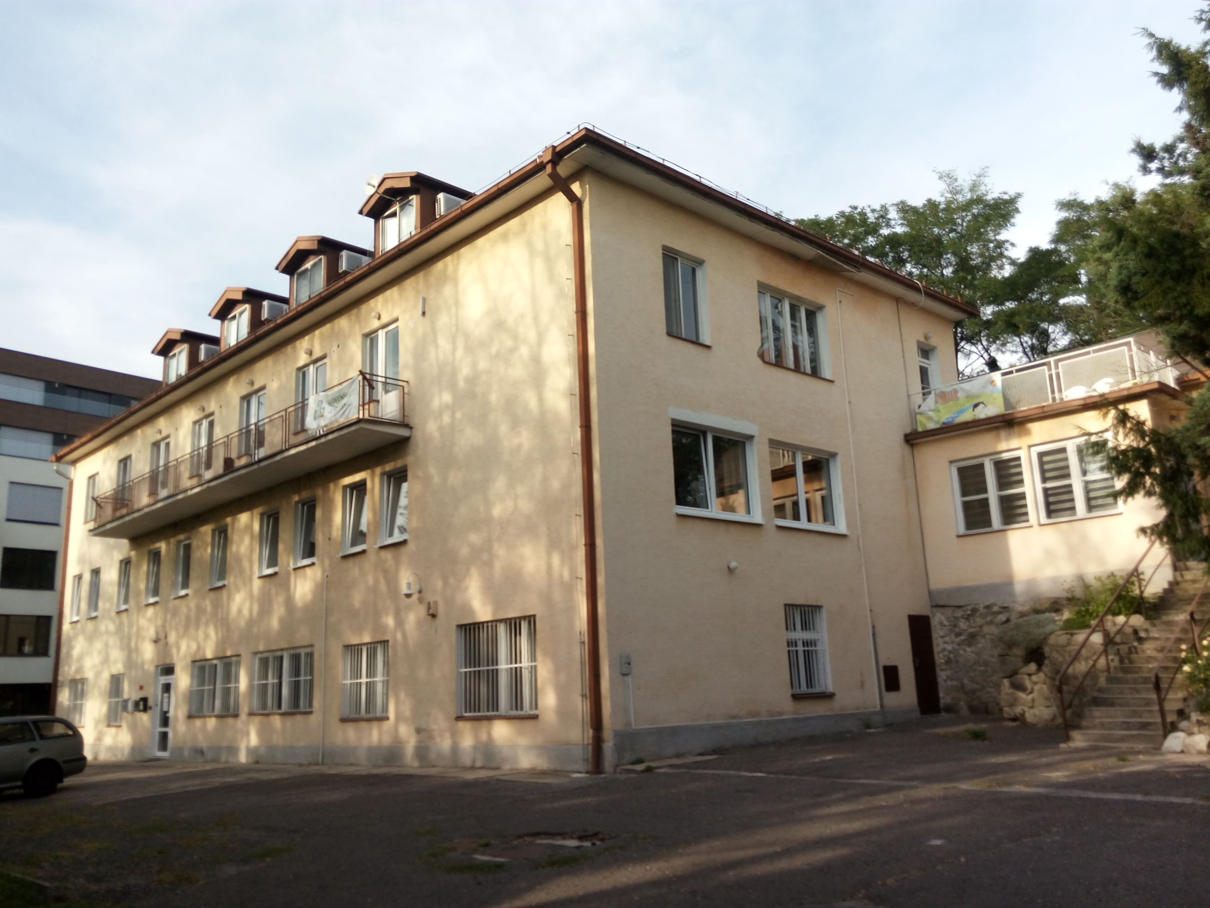 Mokrohájska 6, Karlova Ves, Bratislava